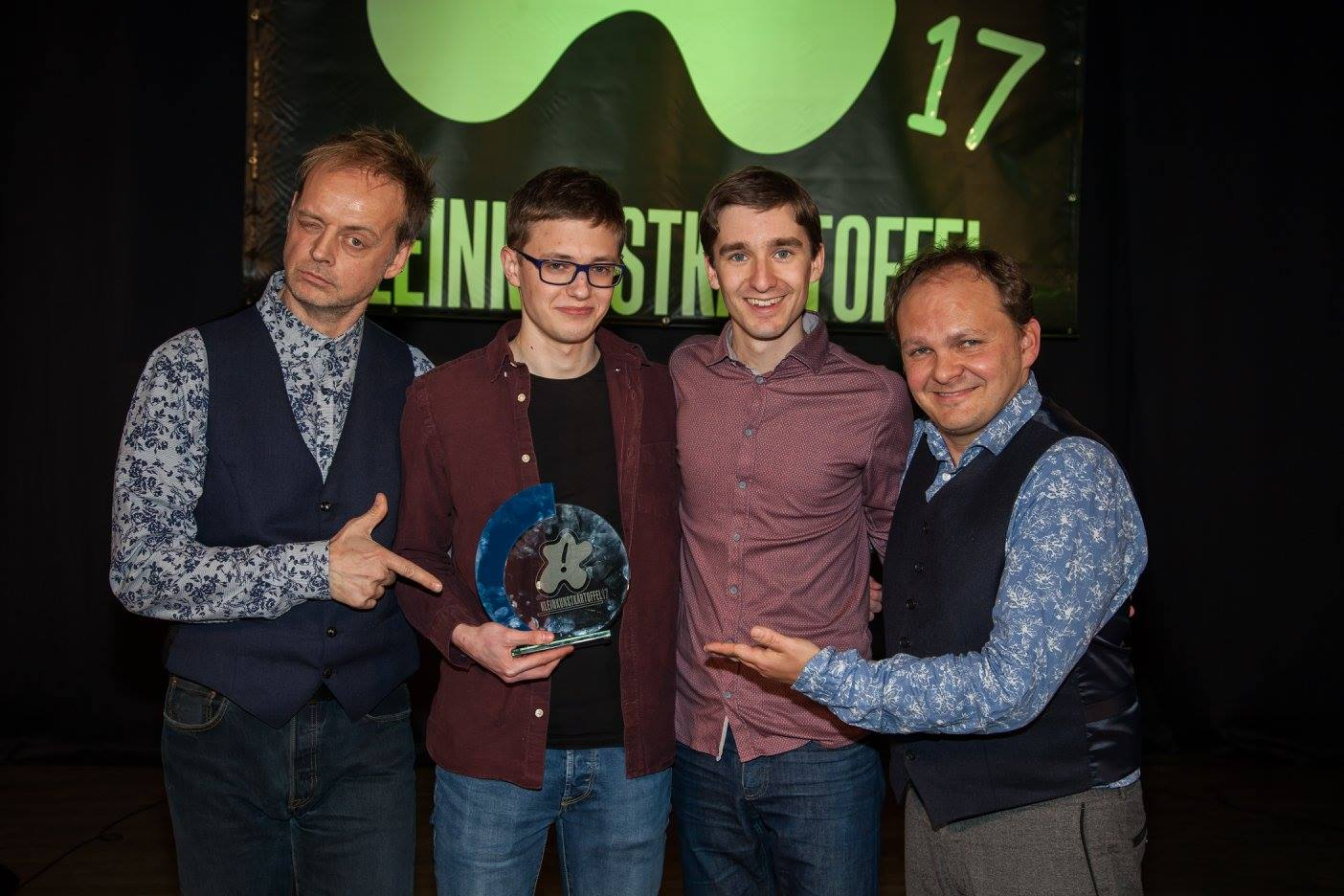 Christof Fritz gewinnt die Kleinkunstkartoffel 2017. BlöZinger und Clemens Maria Schreiner gratulieren.